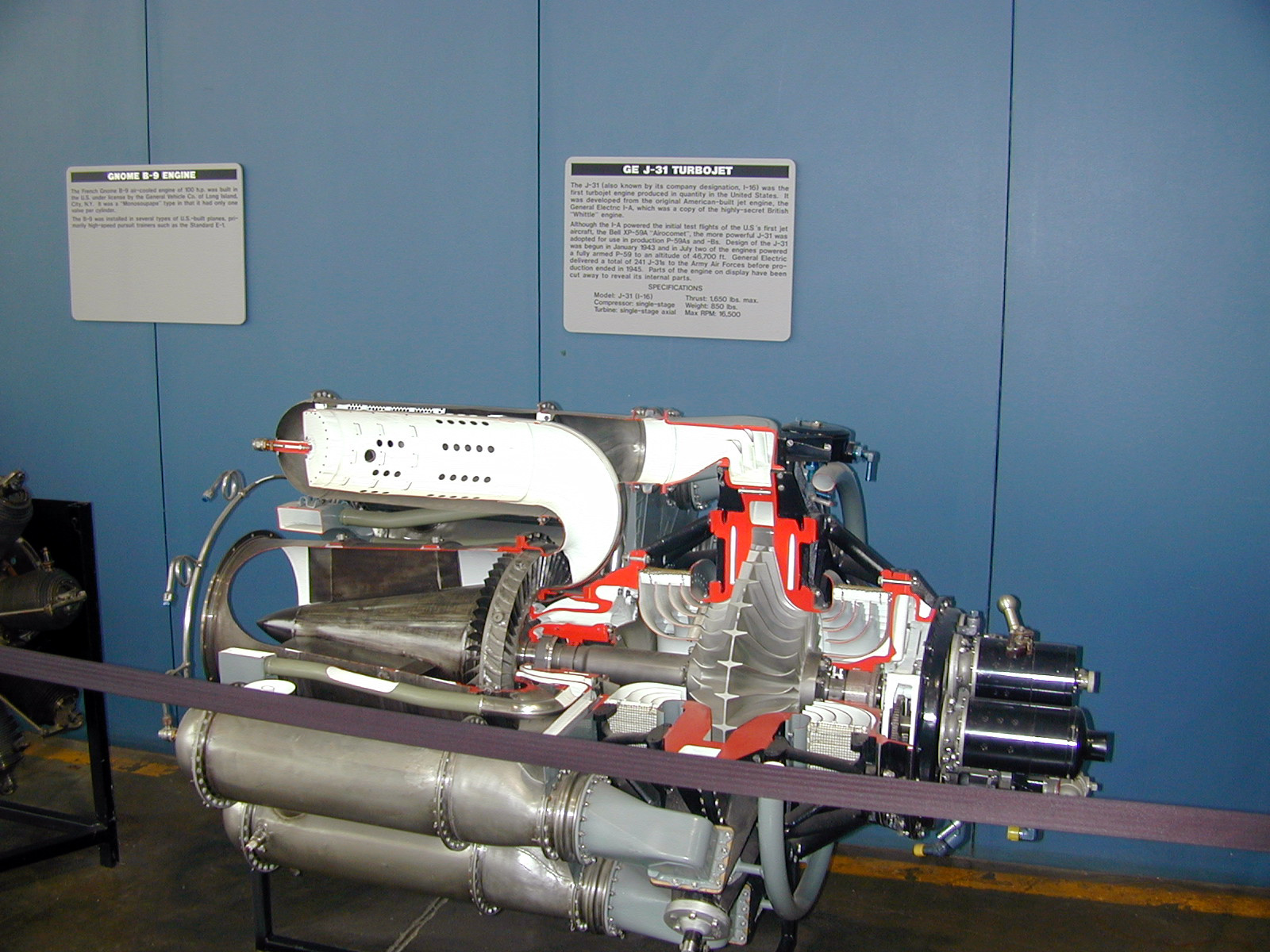 General Electric J31 Turbojet Engine